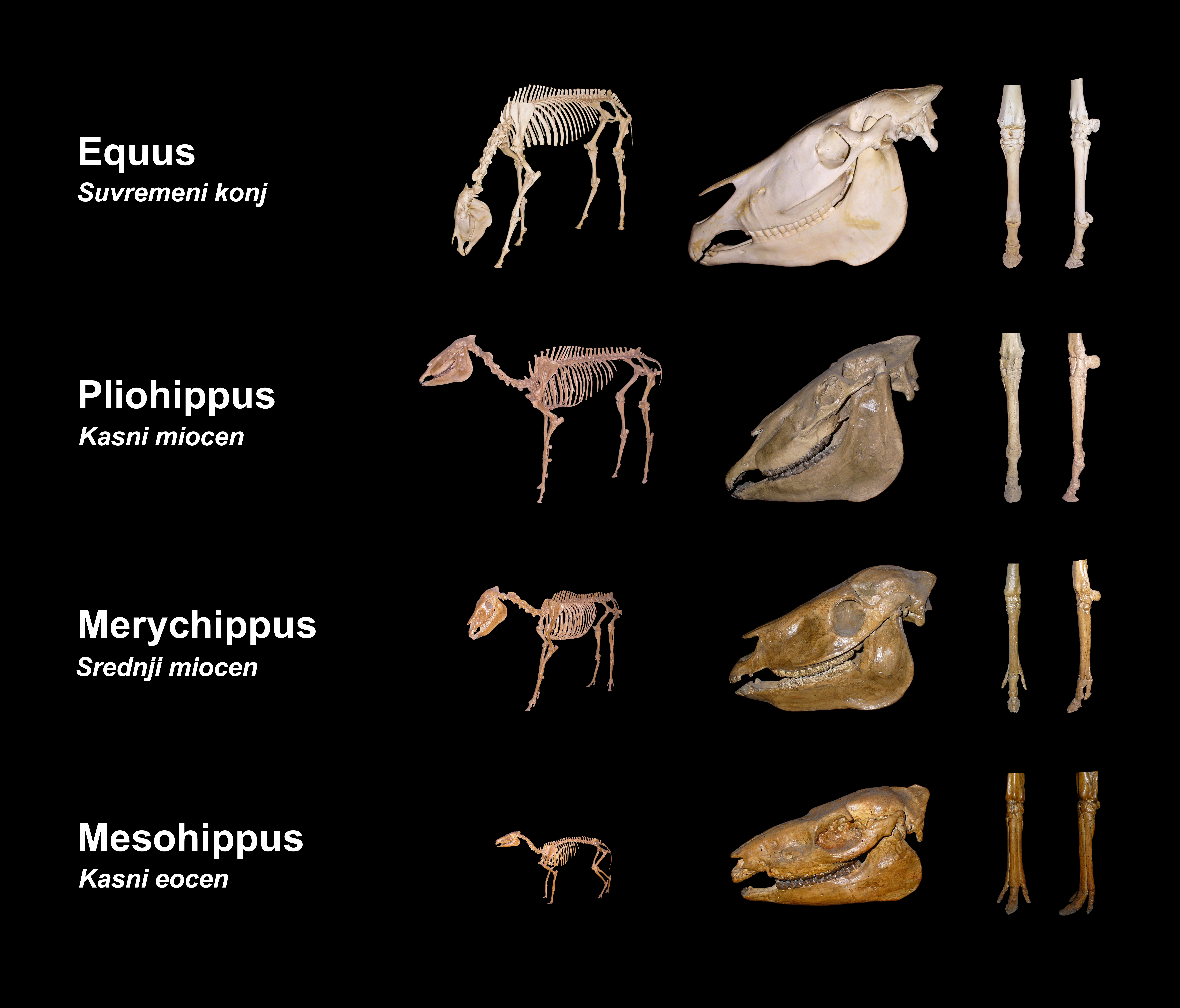 Evolucija skeleta konja